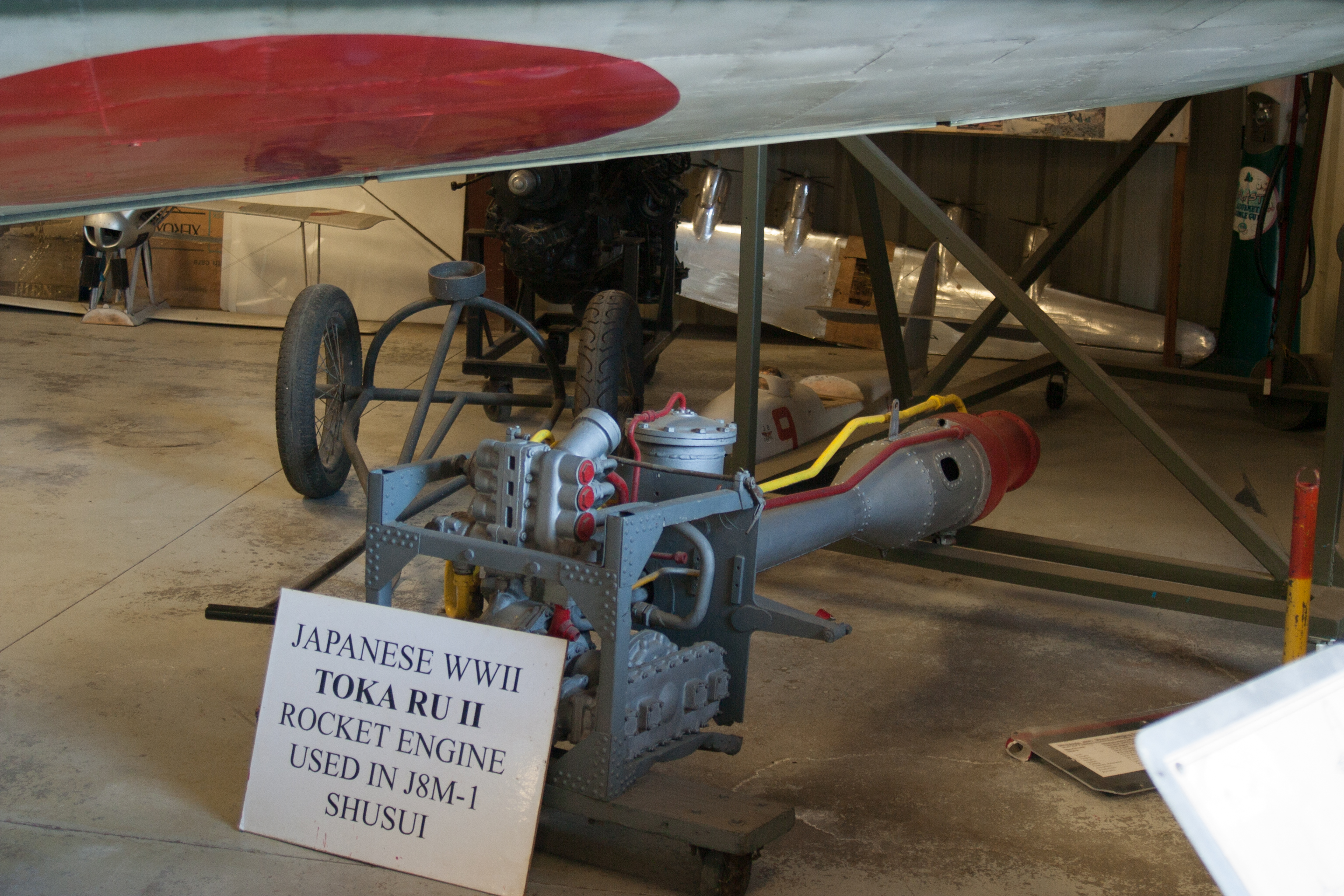 Toka Ru II Rocket Engine